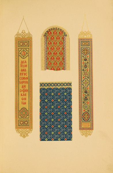 Рисунок закладки, форзаца и обреза книги "Византийские эмали Звенигородского" из книги Стасов В. В. История книги А.В.Звенигородского. — СПб., 1898